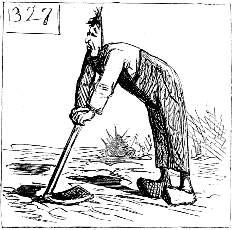 Un malheureux paysan fouille partout avec sa pioche dans l’espoir de retrouver l’autre moitié de sa tête que M. Millet lui a cachée quelque part.